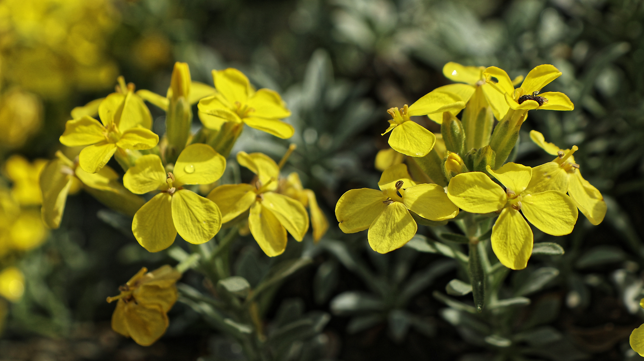 Fibigia , heißt vermutlich inzwischen Alyssoides an einem Felsgestein wachsend